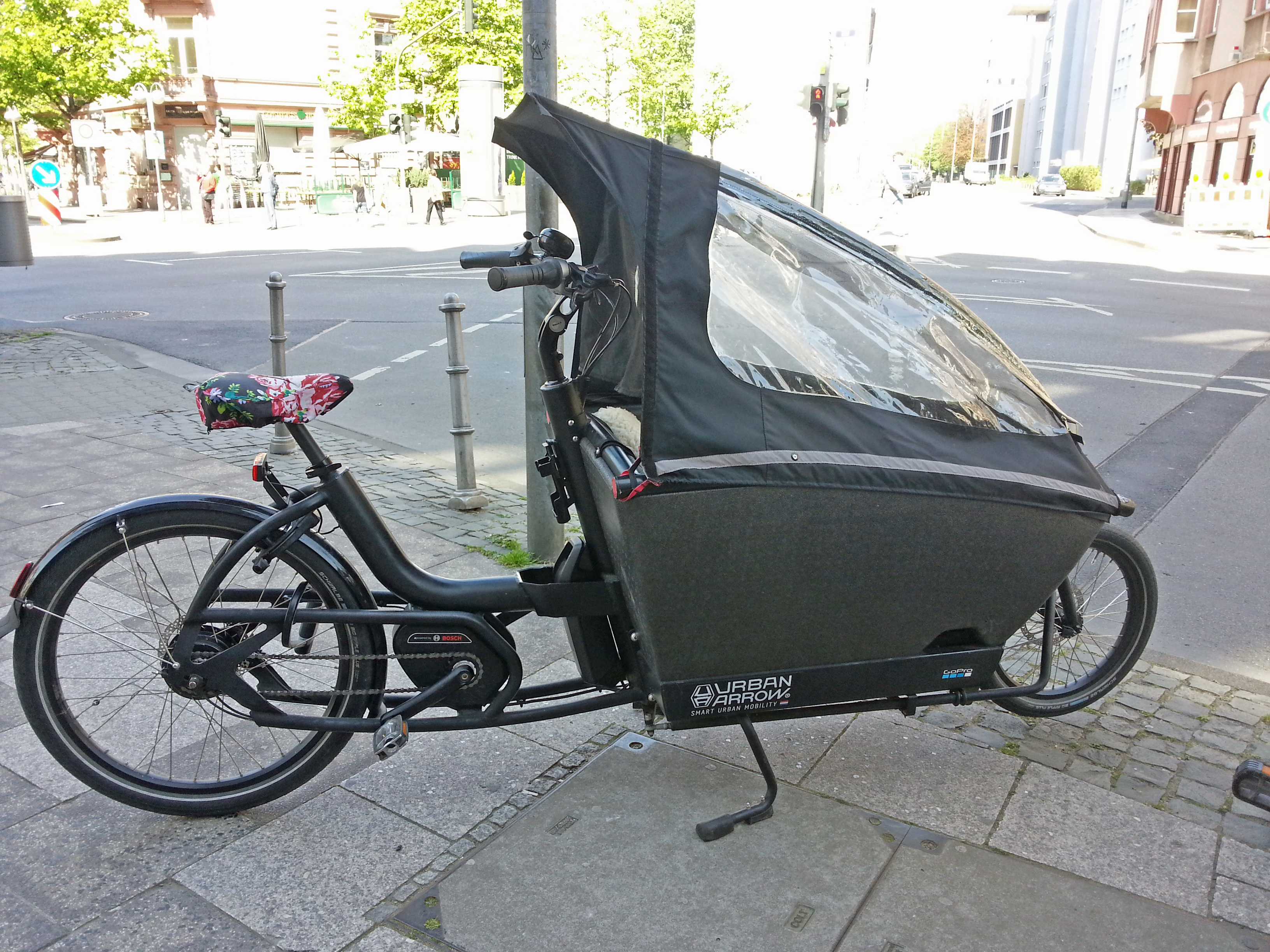 Kinder- und Warentransport-Pedelec, von Urban Arrow, 2019 in Frankfurt am Main.